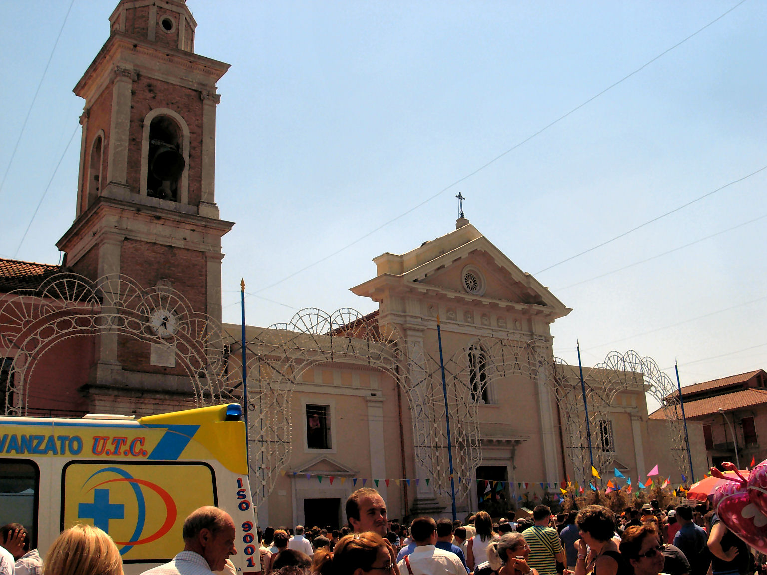 La Chiesa di Santa Maria di Costantinopoli a Foglianise (BN), Italia